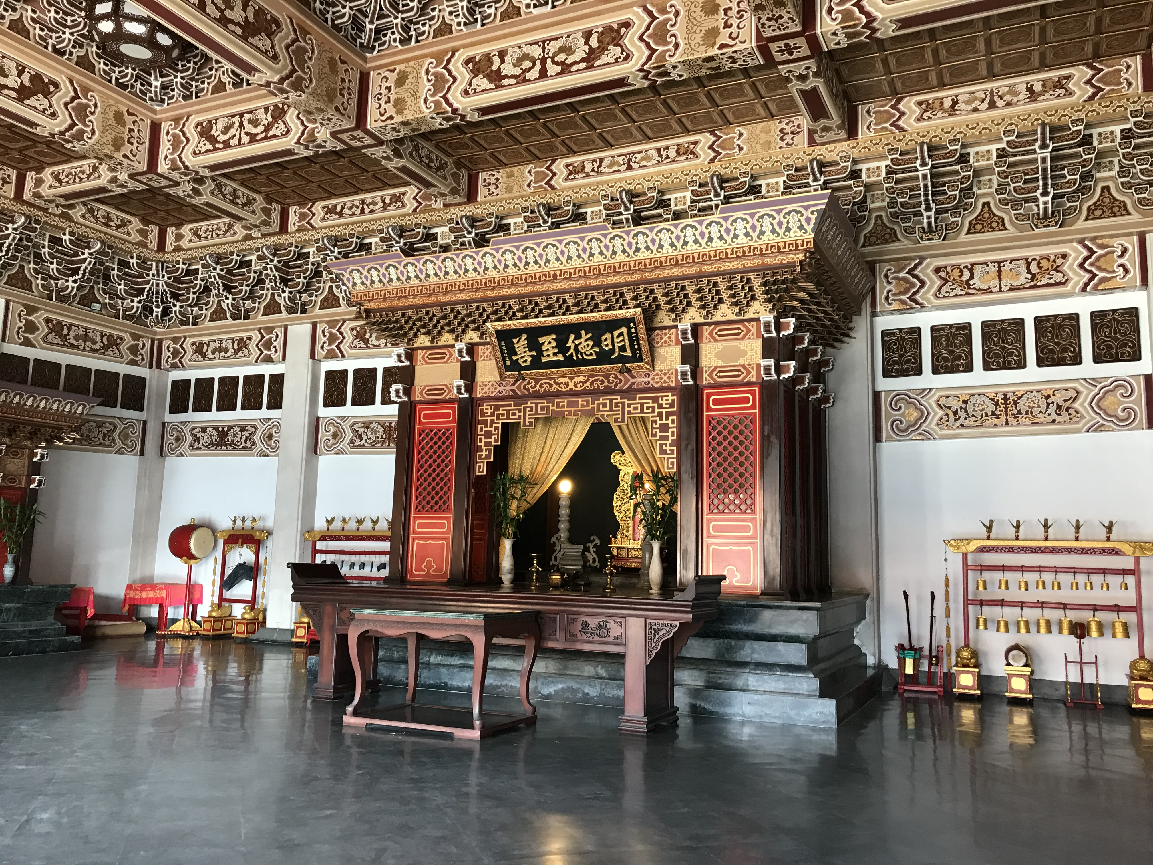 臺中孔子廟大成殿內